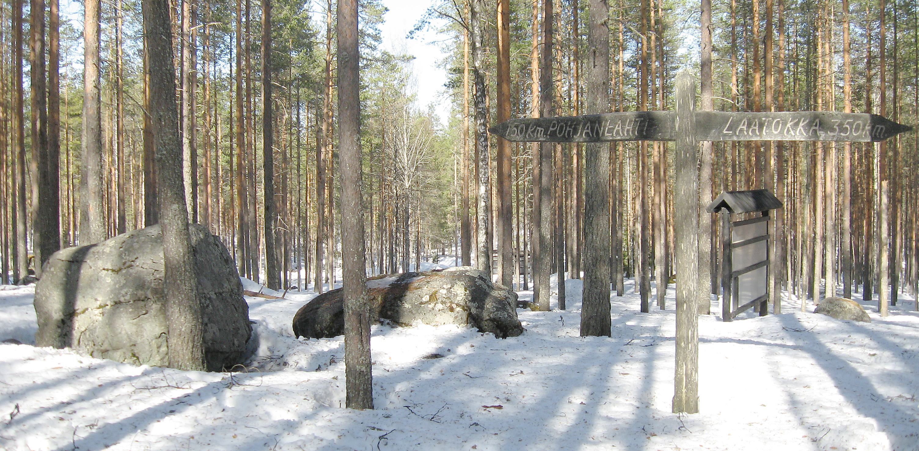 Rillankivi on siirtolohkare ja rajakivi Pielaveden, Pihtiputaan ja Pyhäjärven kuntien rajalla. Samalla kohtaa on myös Pohjois-Pohjanmaan, Pohjois-Savon ja Keski-Suomen raja. Rillankivi on alueen tunnetuimpia nähtävyyksiä.